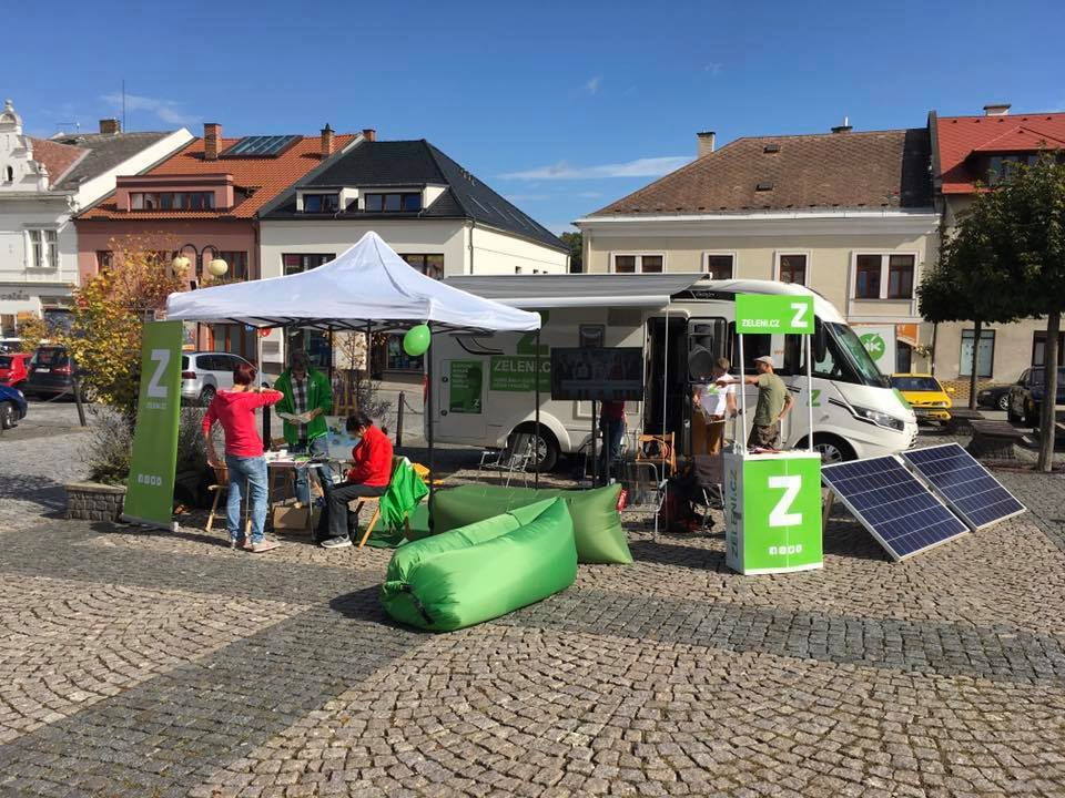 Zelení použili při kampani do PSP ČR karavany s napojenými solárními panely, u nichž diskutovali s voliči, Česká Třebová, Autor: Strana zelených, 13. 9. 2017